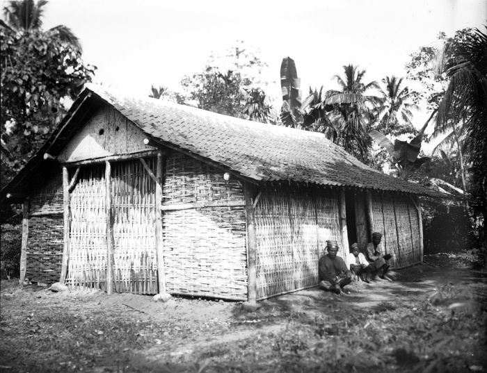 Lichtbeeld. Verbeterd, pestbestendig, huis op Java